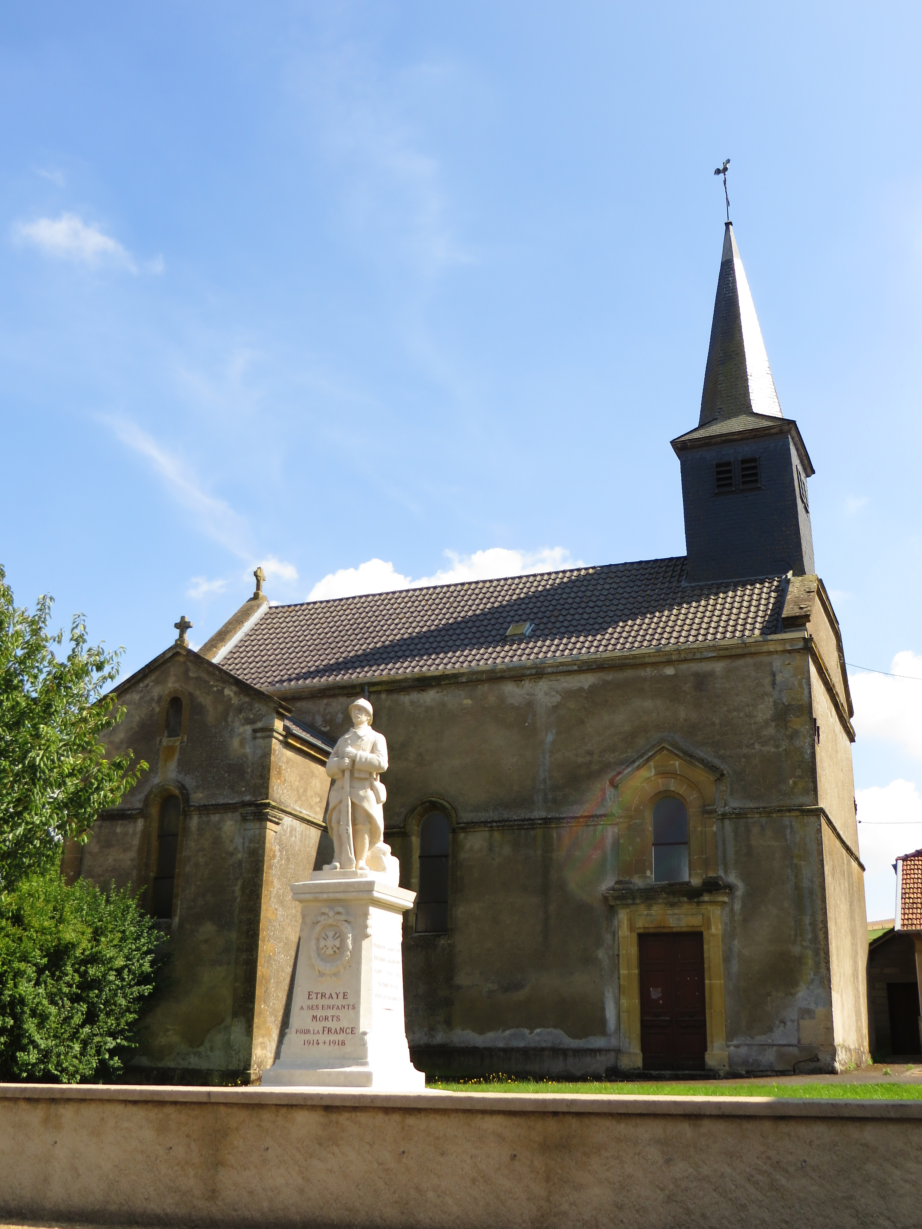 Etraye Église Saint-Jean-Baptiste